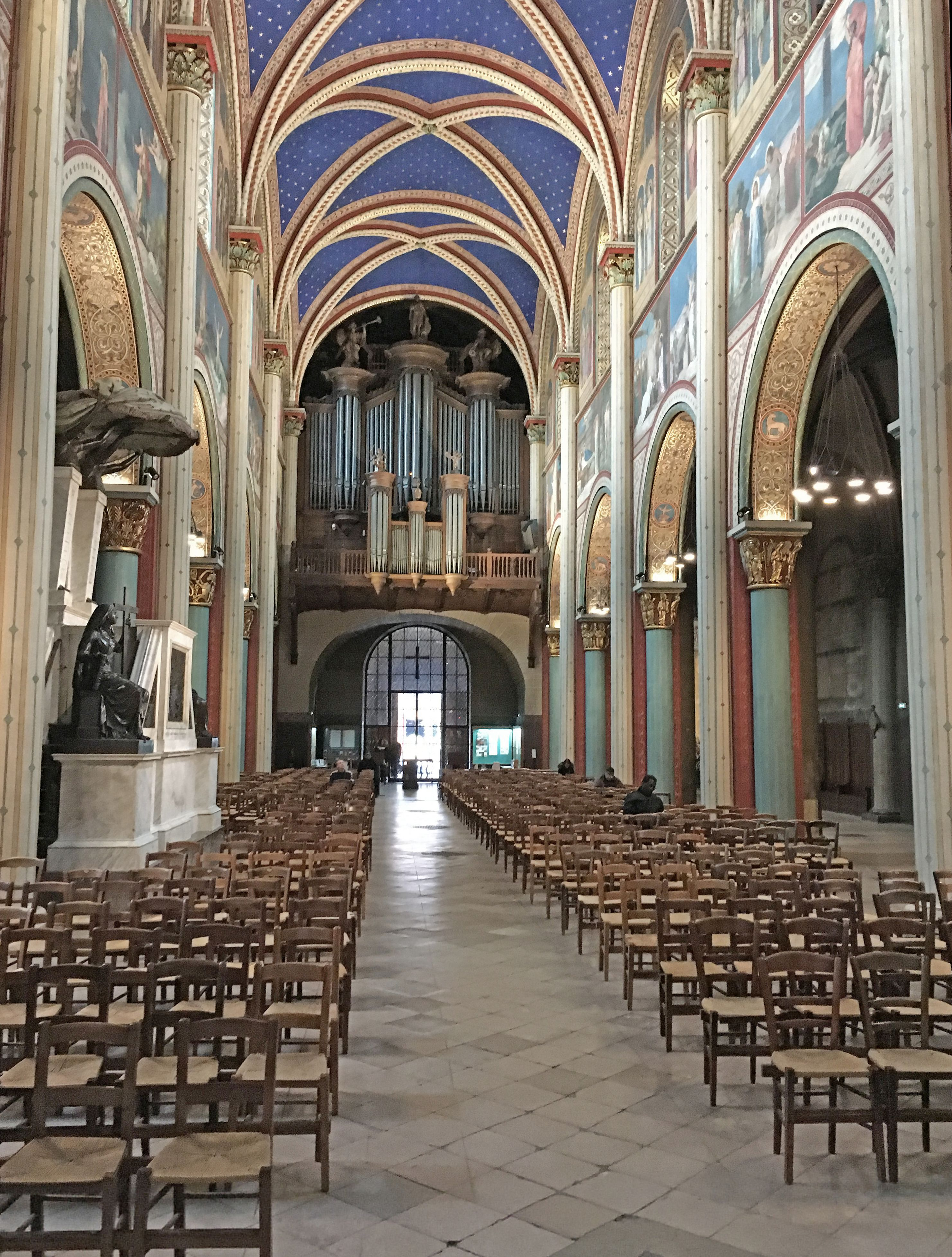 Abbaye de Saint-Germain-des-Près, nef vue vers l'Est, après restauration.